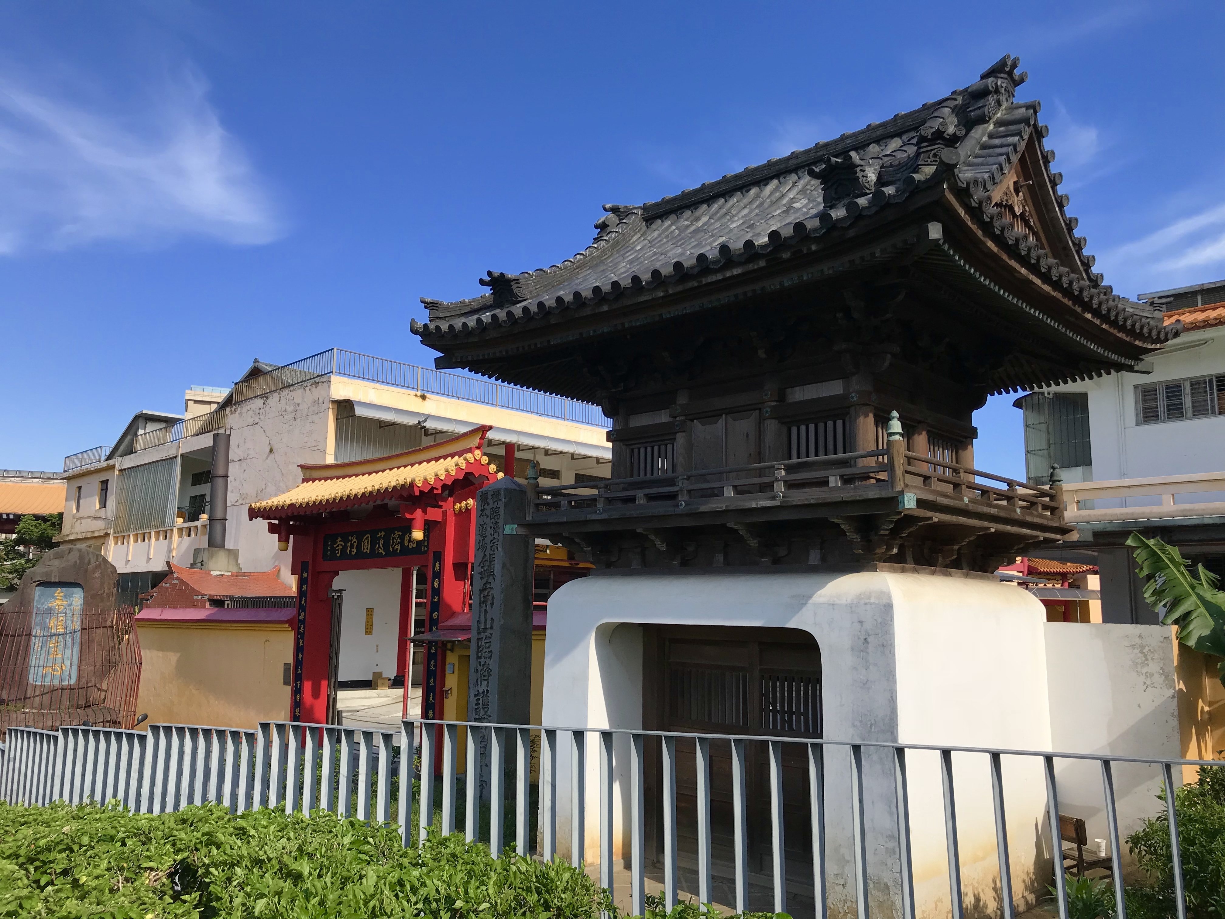 臨濟護國禪寺舊鐘樓山門